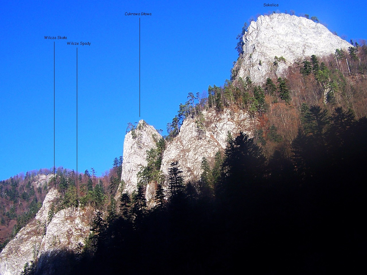 Wilcza Skała, Wilcze Spady, Cukrowa Głowa i Sokolica w Pieninach. Widok z Drogi Pienińskiej